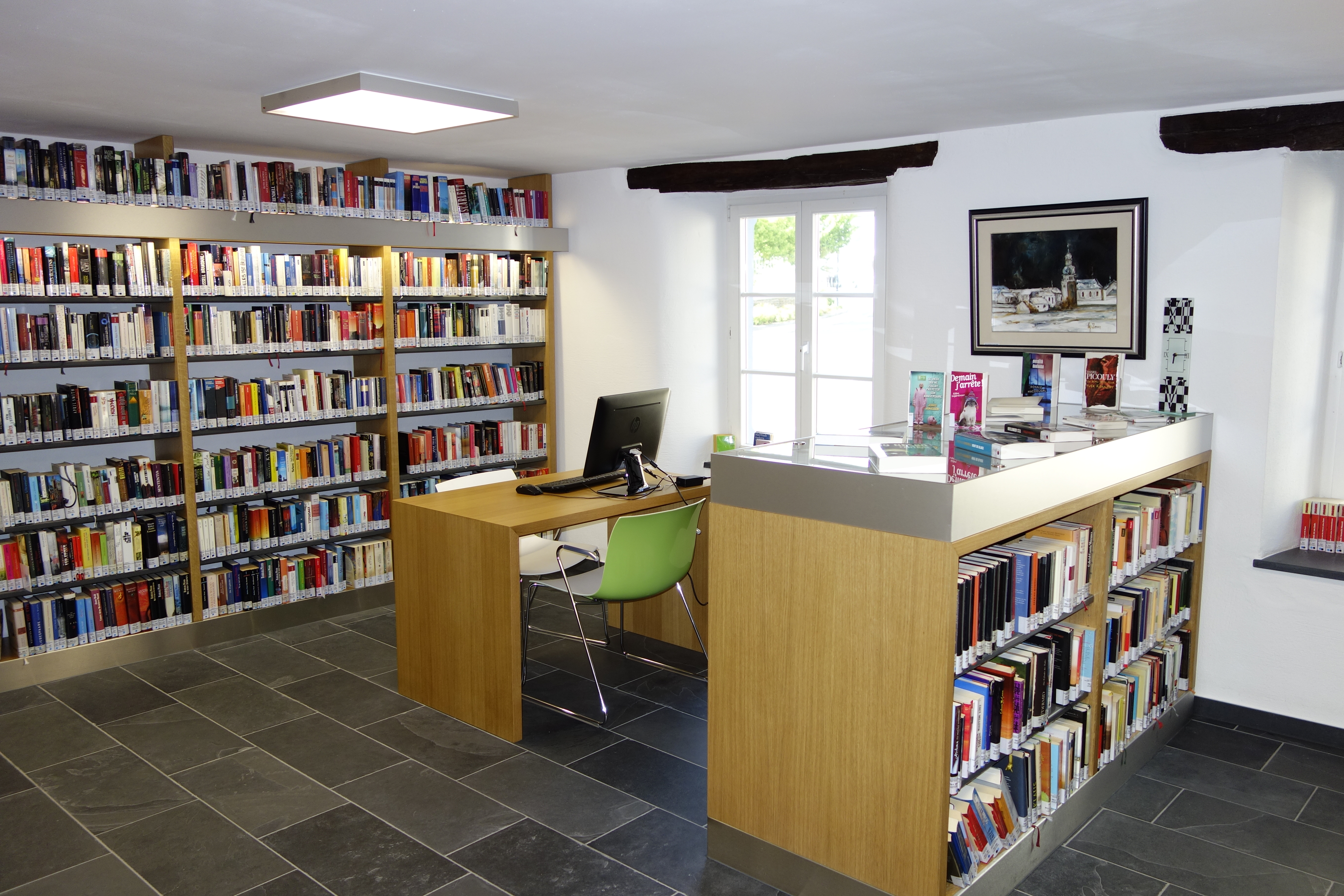 1. Stack Bibliothéik Tony Bourg Kategorie:Gemeng Ëlwen